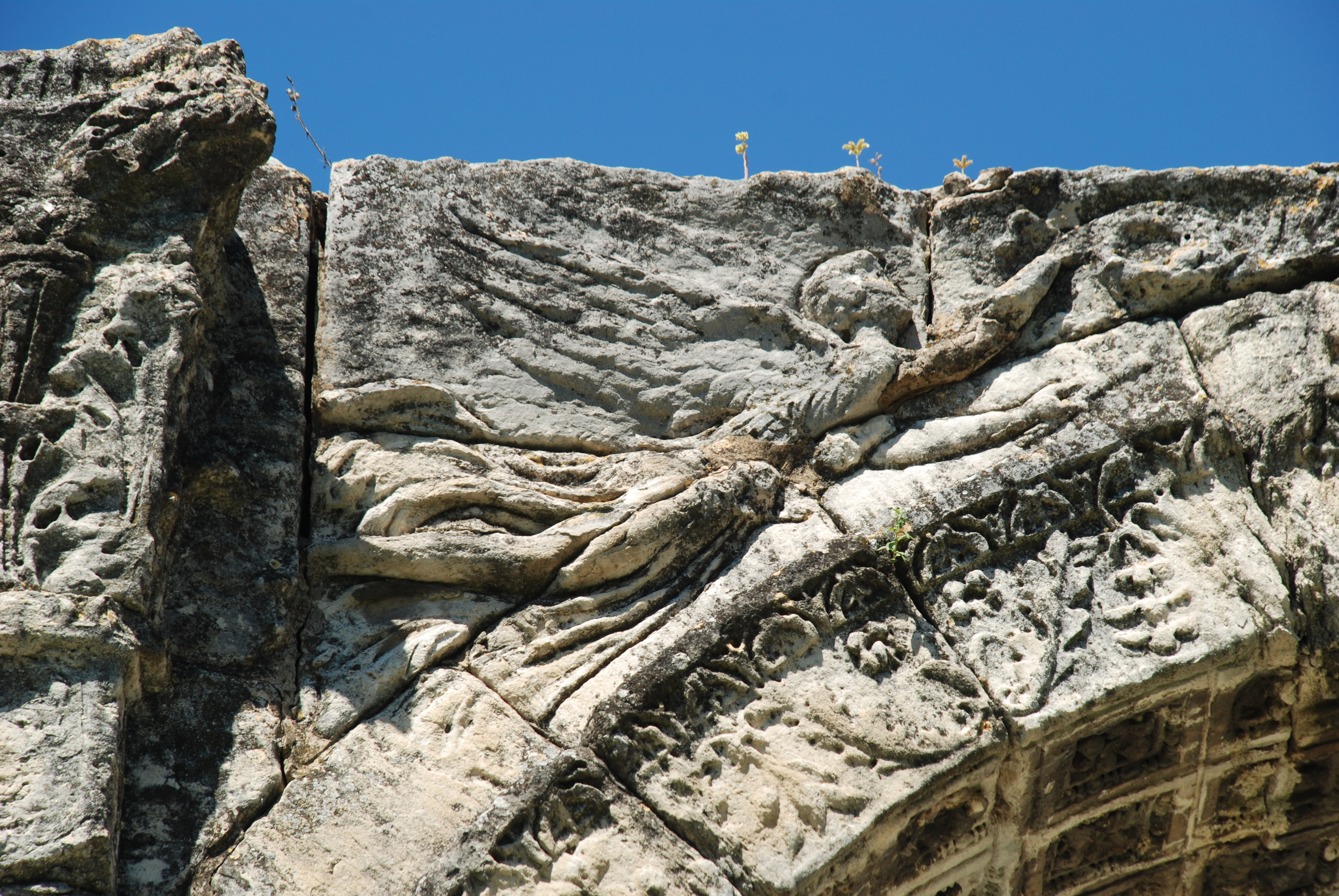 France - Provence - Vaucluse - Arc antique de Cavaillon